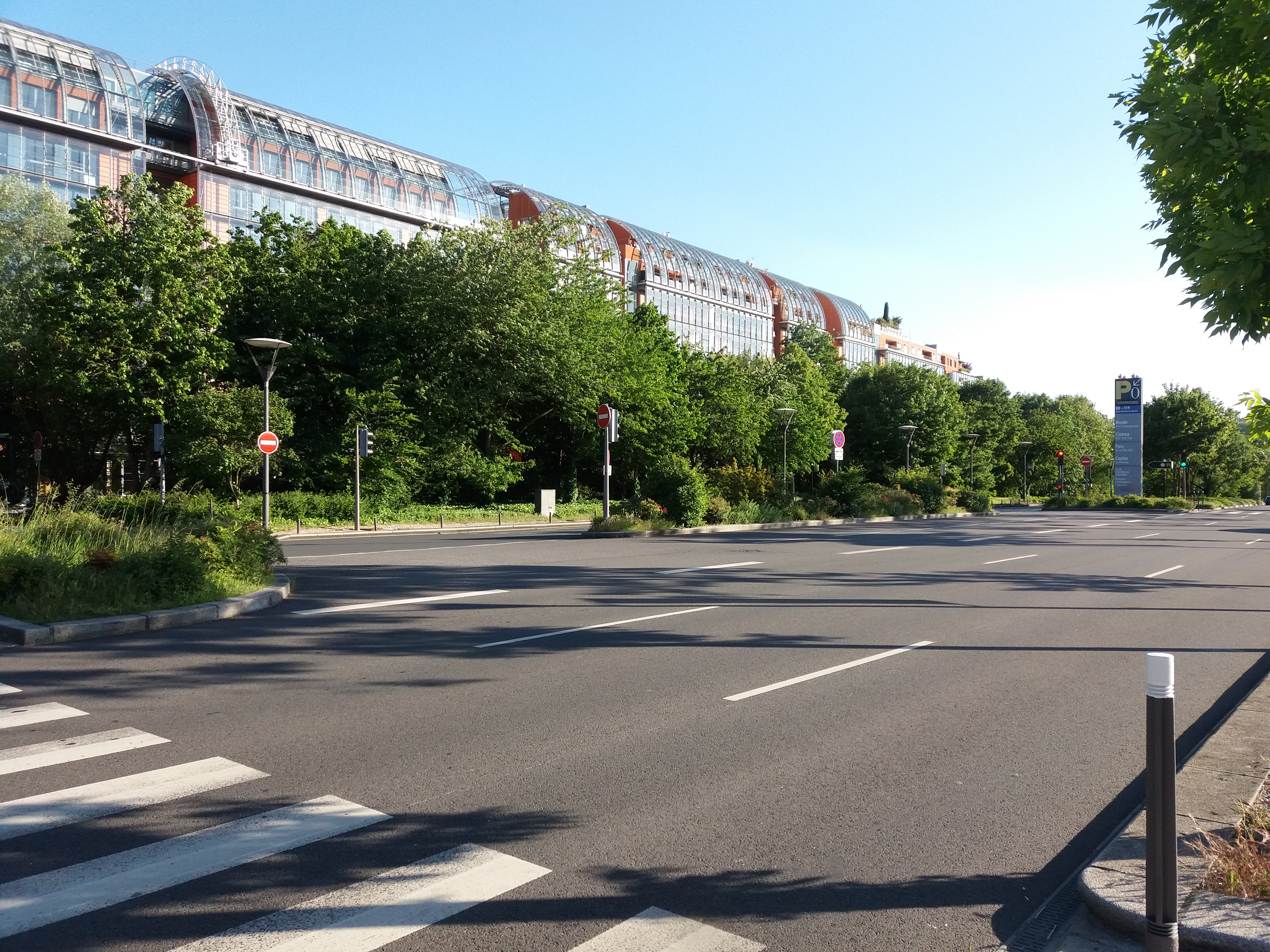 Côté sud, avec vue sur la Cité Internationale.